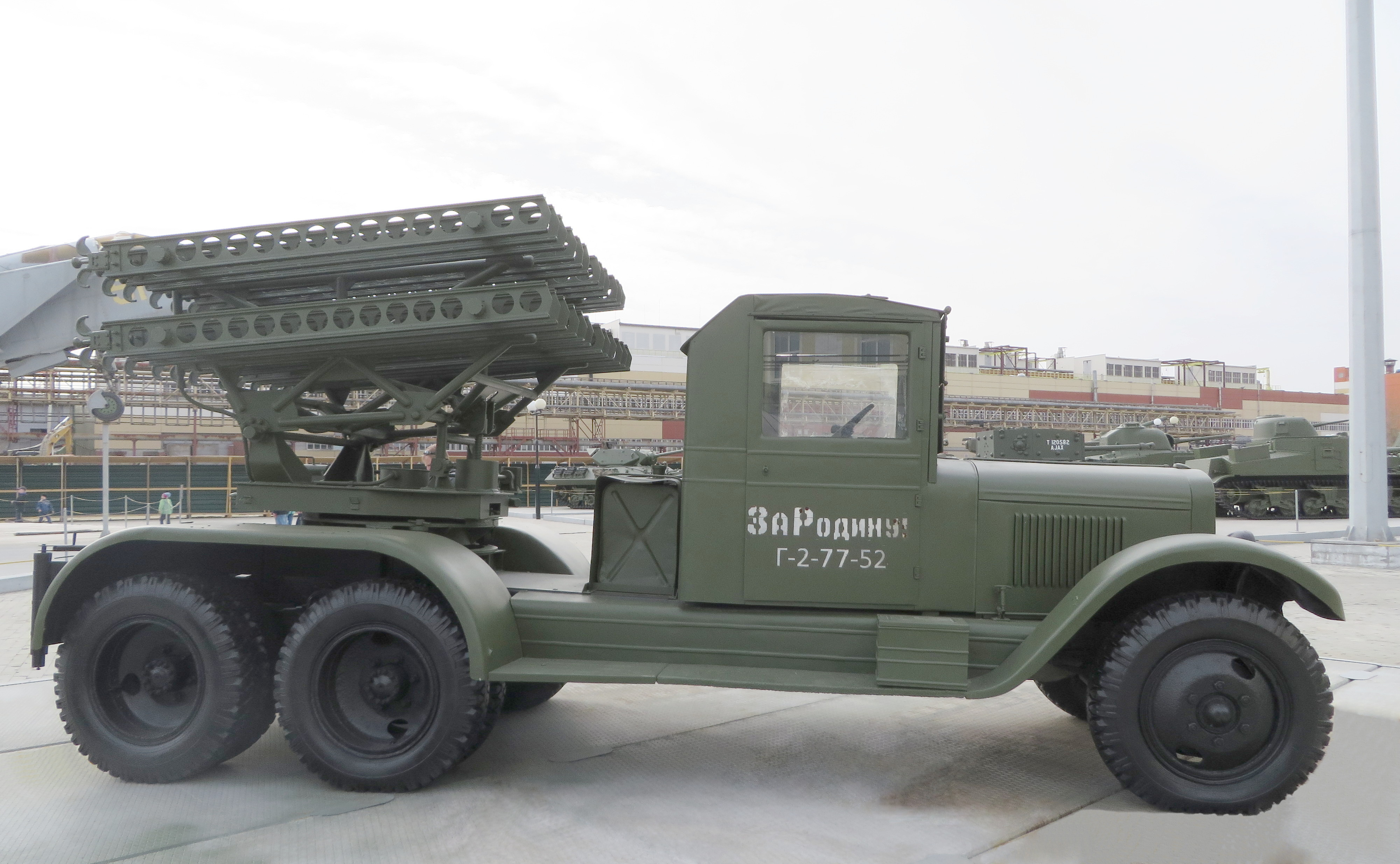 БМ-8-48 в Музее военной техники УГМК